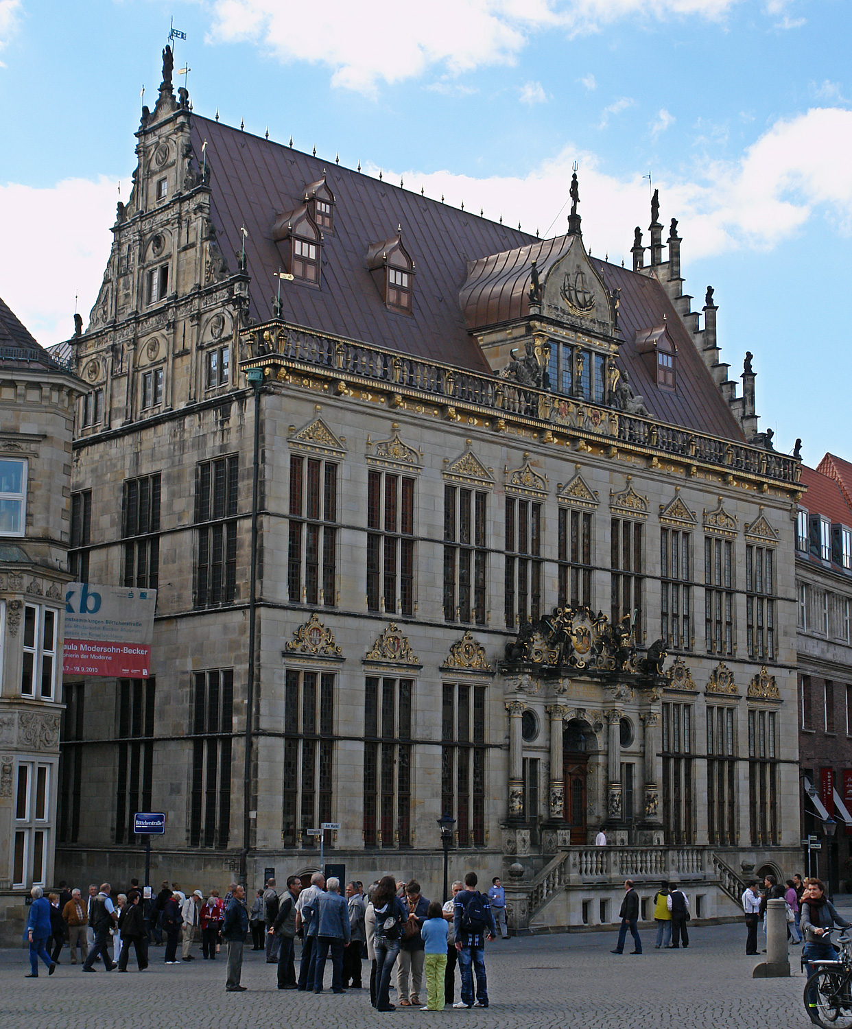 Haus Schütting am Bremer Marktplatz nach der Renovierung 2010 Das abgebildete Objekt ist ein geschütztes Kulturdenkmal in der Freien Hansestadt Bremen, mit der Nr. 0072 beim Landesamt für Denkmalpflege registriert.